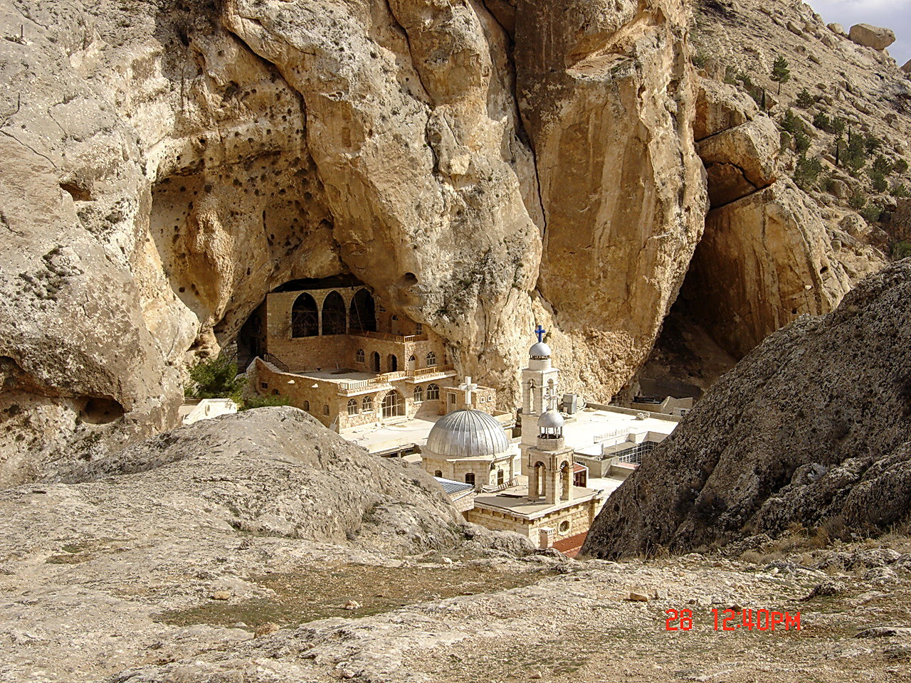 معلولا, قرية صغيرة بجوار العاصمة السورية دمشق, اللقطة تظهر دير مار تقلا